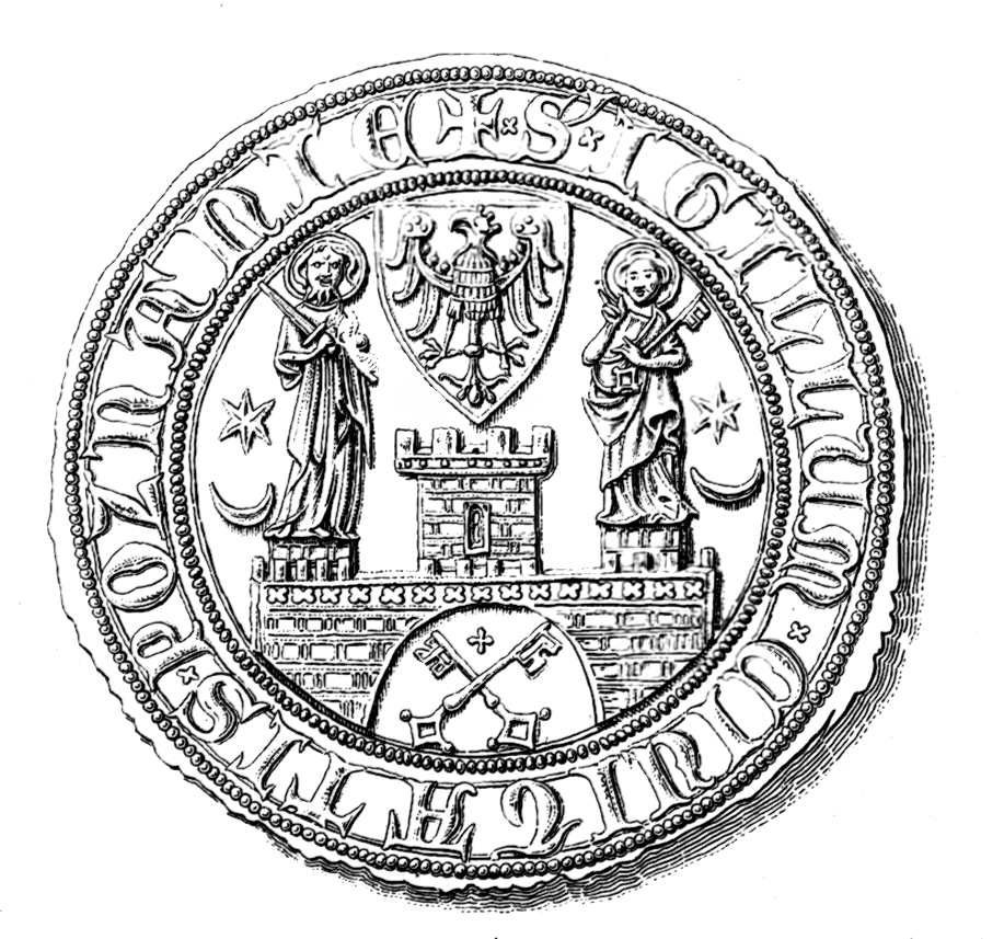 Poznań seal from XIV century